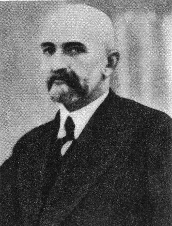 Walery Sławek (1879-1939)